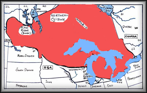 Overzichtskaart van het gebied waar de Ojibwetaal wordt gesproken, 19e eeuw tot heden. Bron: Jaawano Giijik